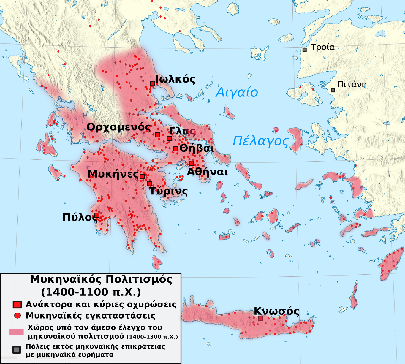 Χάρτης του Μυκηναϊκού πολιτισμού